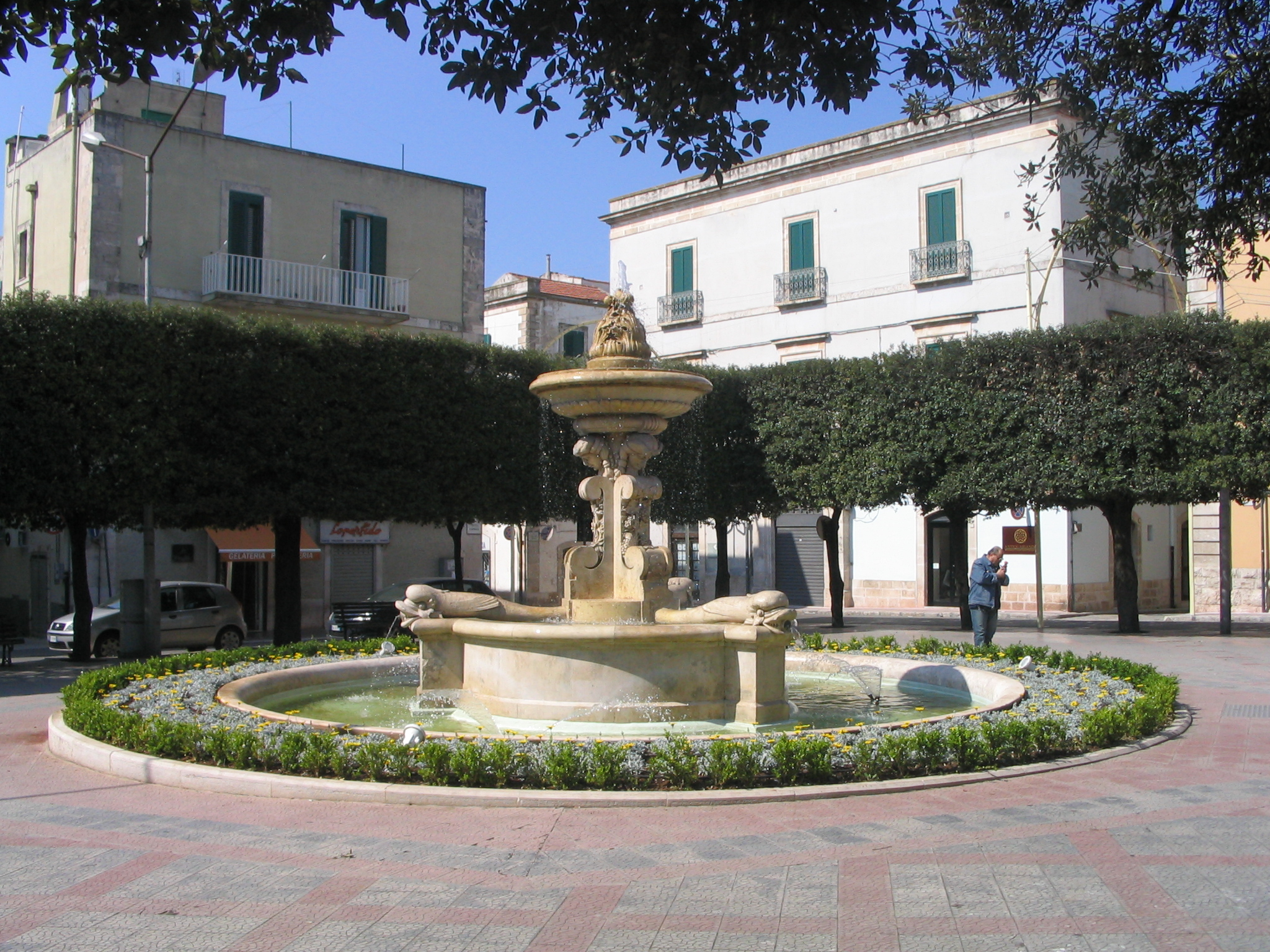 Immagine personale